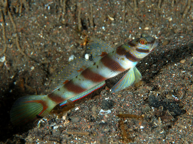 ハチマキダテハゼ Amblyeleotris diagonalis